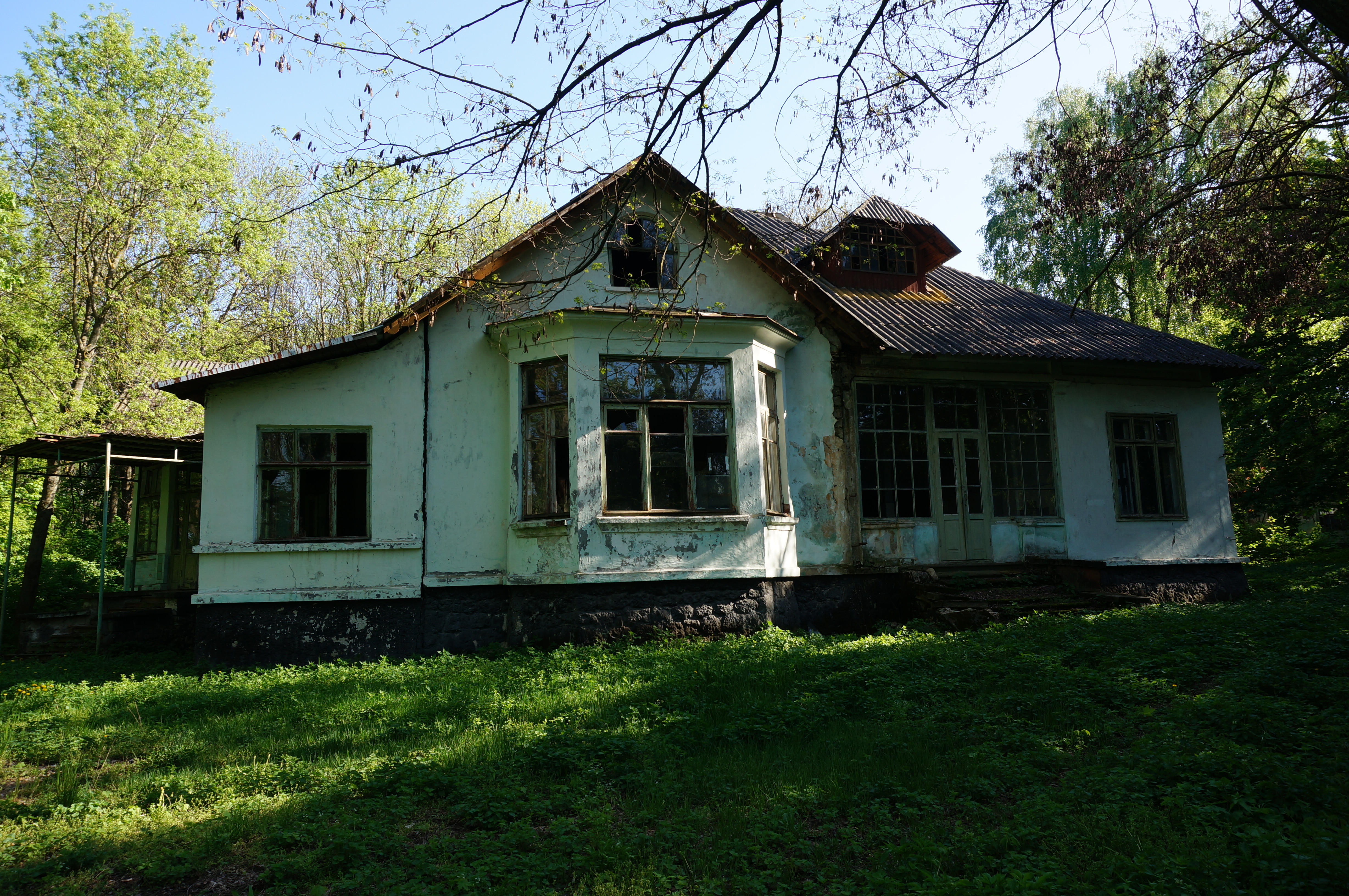 Parcul din satul Rediul Mare, monument al naturii amplasat în raionul Dondușeni, satul Rediul Mare (cod MD-DN-map-009)